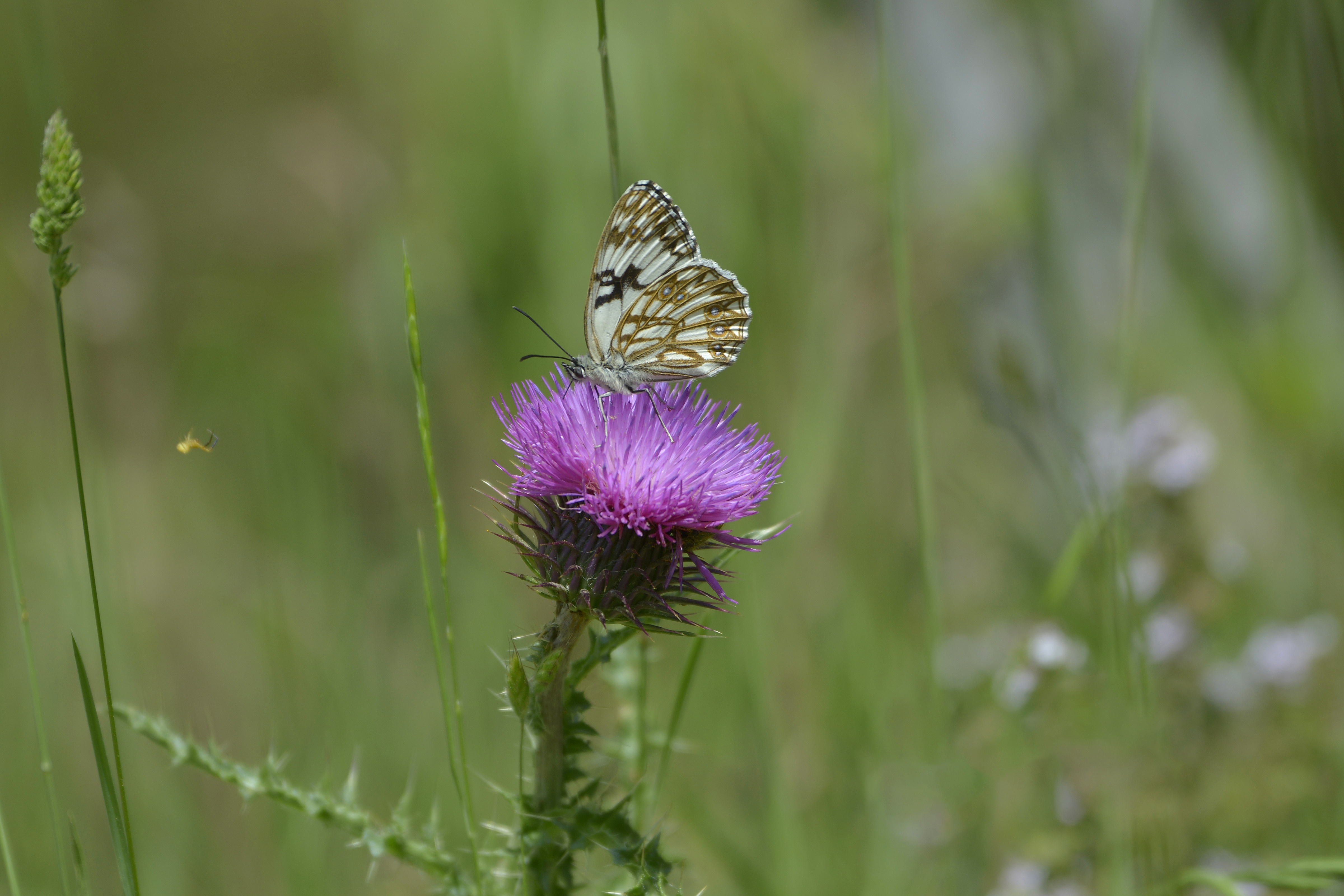 Melanargia Occitanca Echiquier d'Occitanie Mâle